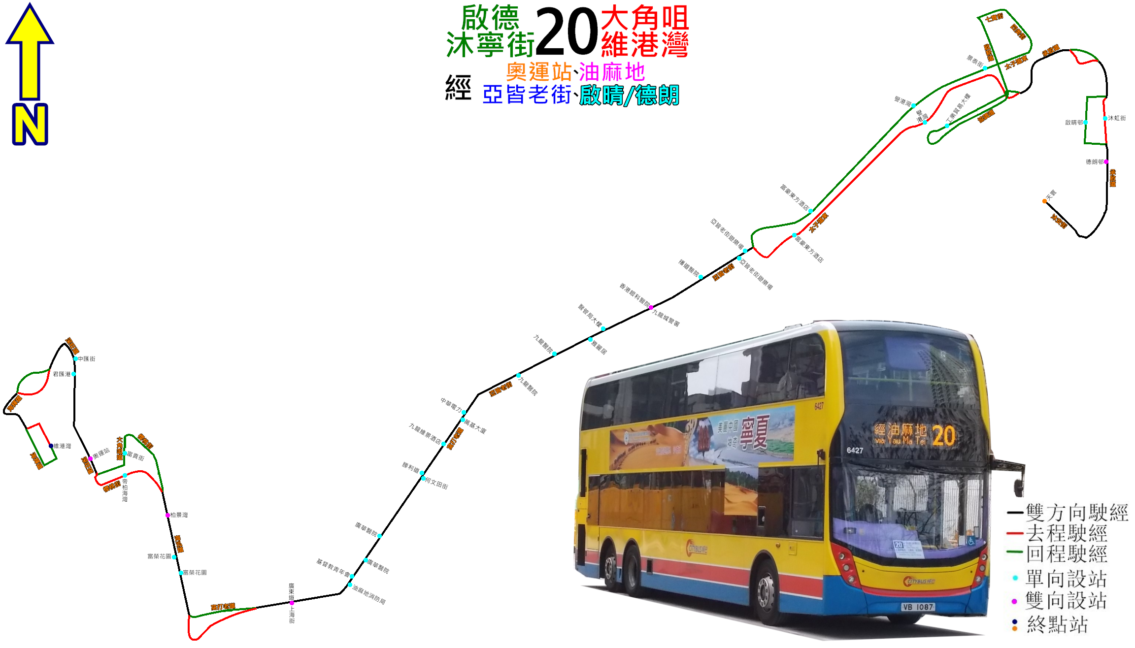 城巴20線的走線圖